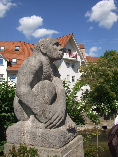 Veringenstadt, Landkreis Sigmaringen Denkmal "Neandertaler" auf der unteren Lauchertbrücke, zur Erinnerung daran, dass Höhlen im Stadtgebiet bedeutende steinzeitliche Funde ermöglichten. Inschrift am Sockel: "So wie dieser aus einem mächtigen Muschelkalkblock gehauene Urmensch in sich ruhend Ausschau hält, so sassen vor etwa 50 000 Jahren Menschen vom Schlage des Neandertalers vor den Höhlen um Veringenstadt. Daran soll diese Steinplastik erinnern, die hier als Zeichen für die lange Ahnenreihe der Menschheit steht." Thomas Rathgeber, "Die quartäre Tierwelt der Höhlen um Veringernstadt (Schwäbische Alb)", Laichinger Höhlenfreund 39 (1), 2004, 207-228 (S. 213) naturkundemuseum-bw.de